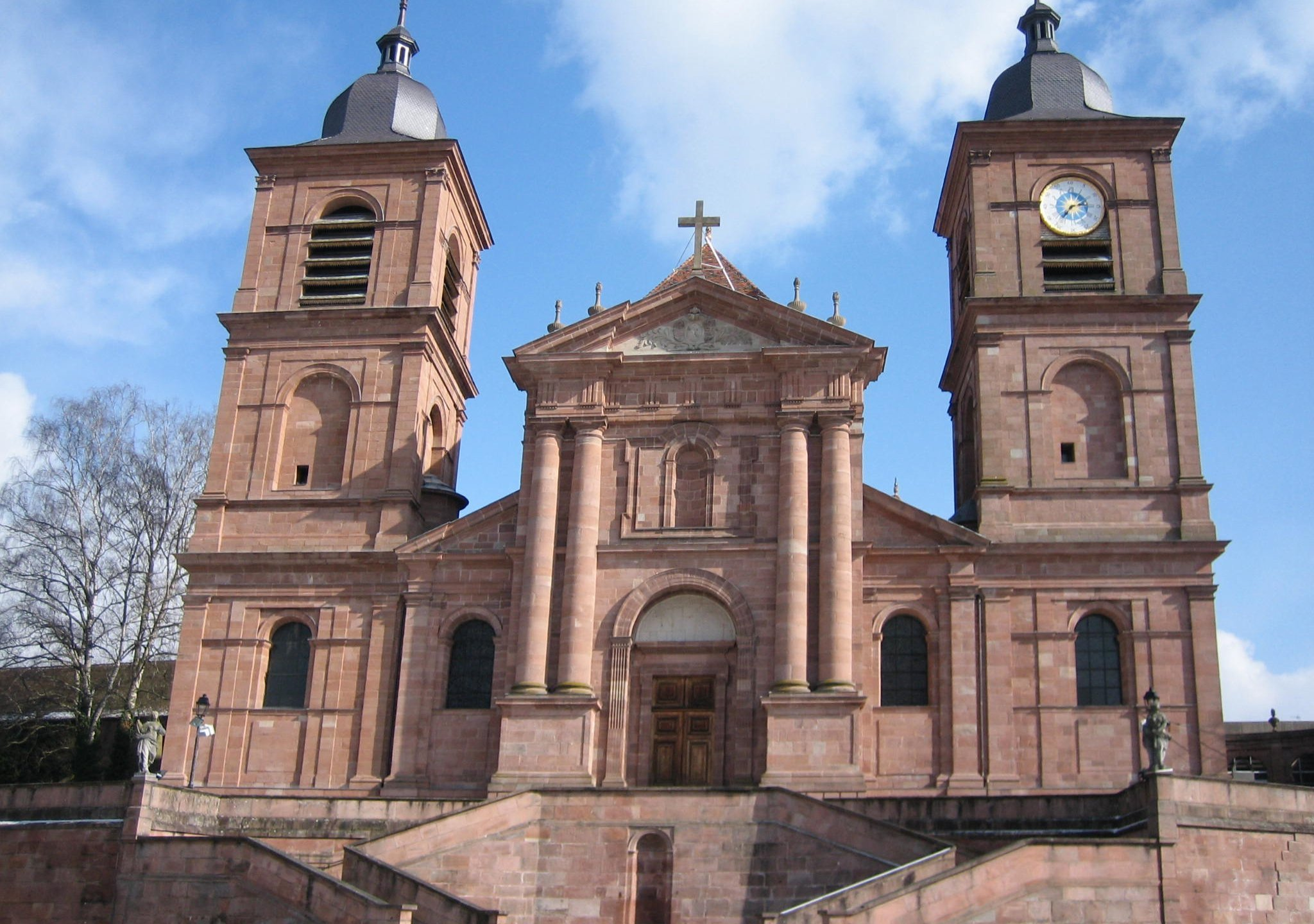 {fr} Cathédrale de Saint-Dié-des-Vosges (88100) France